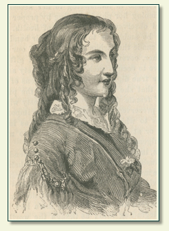 (1853) engraving of Anna Cora Mowatt (1819-1870))